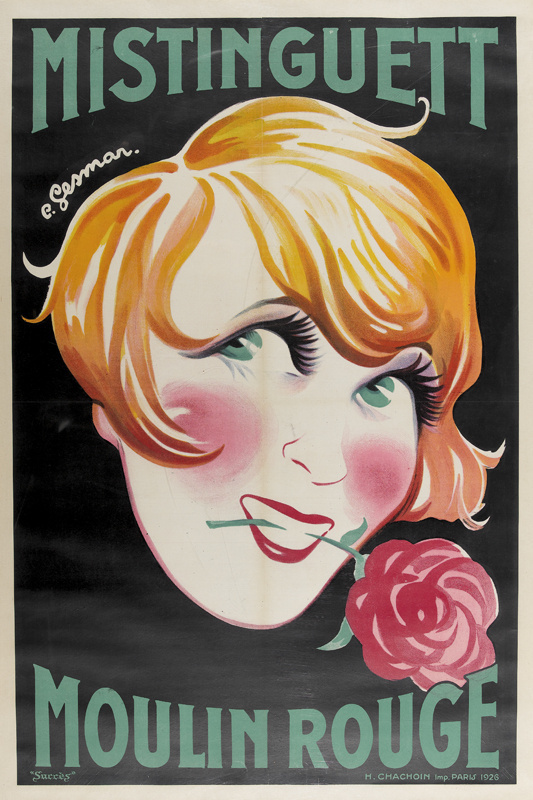 "Mistinguett Moulin Rouge". Farblithografie, dat. 1926, 125 x 85 cm